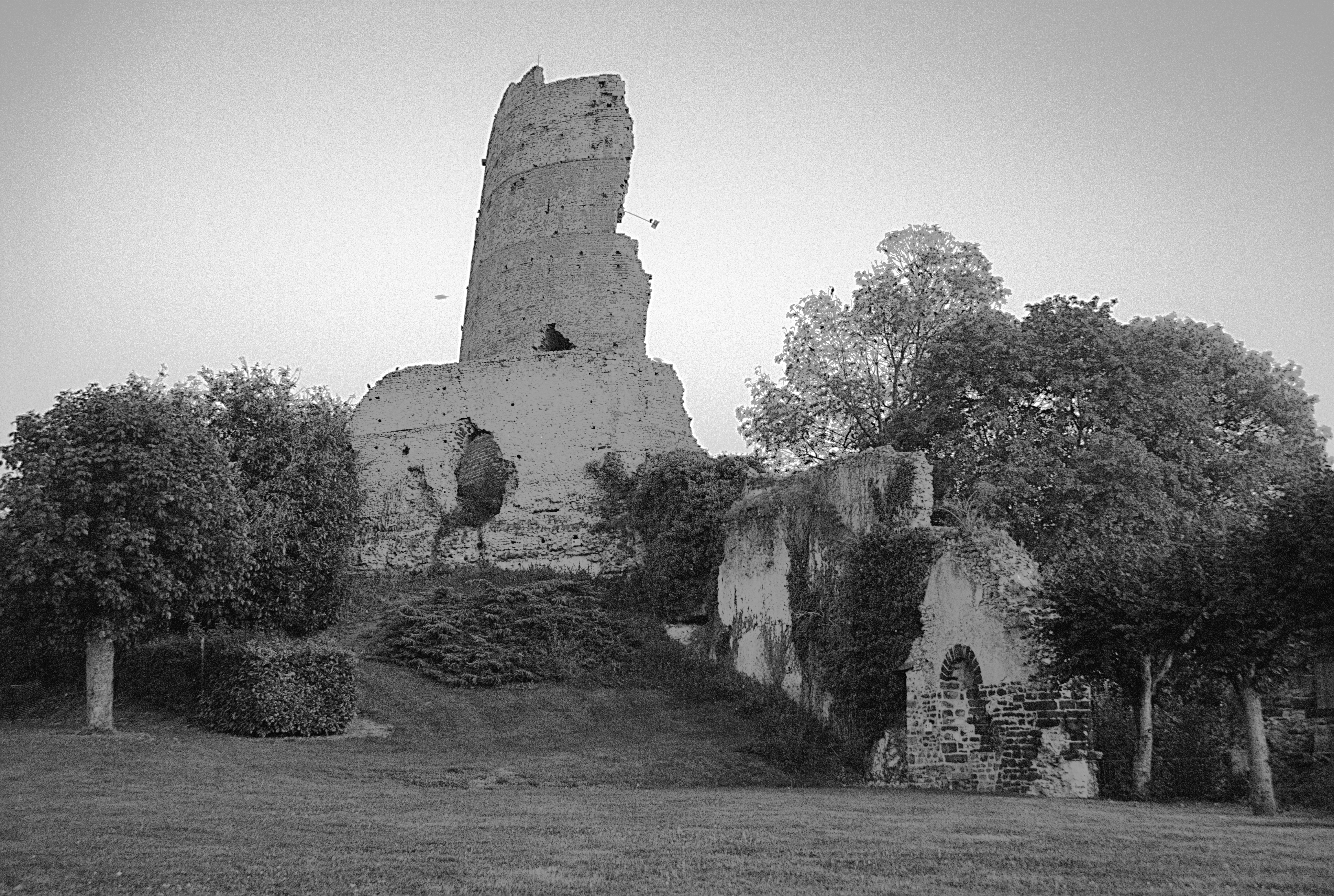 Château de Mondoubleau (Loir-et-Cher, France) .